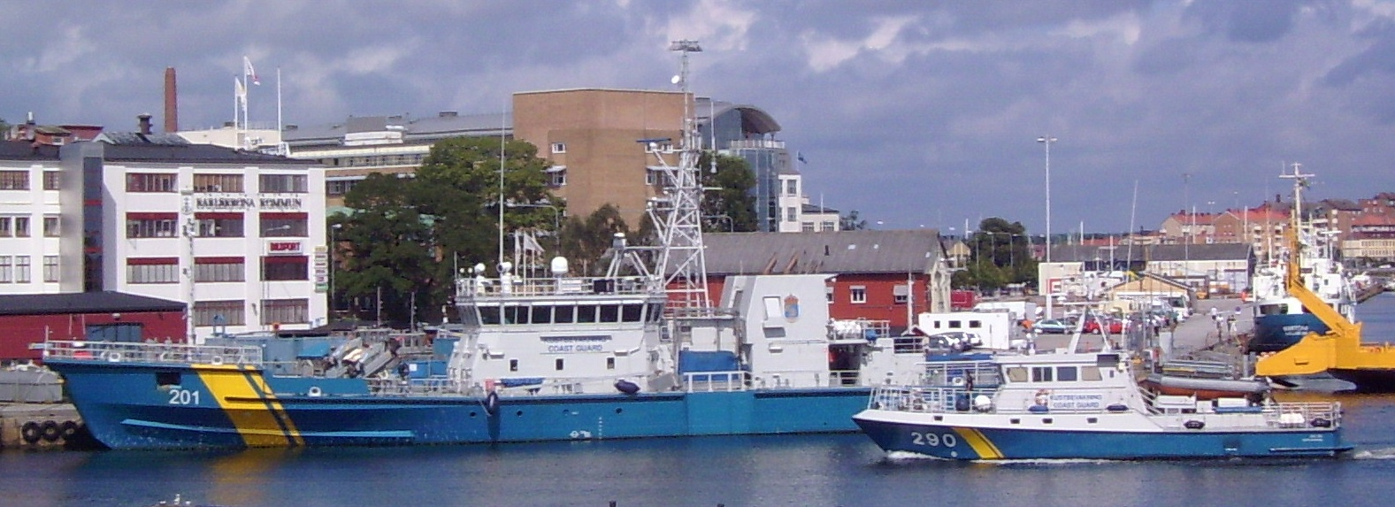 Schiff der Schwedischen Küstenwache mit kleinem Beiboot in Karslkrona / ship of the sweden coastguard with a small dinghy in Karlskrona